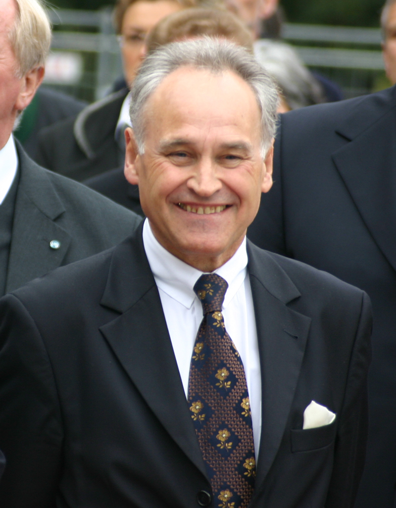 Erwin Huber, CSU-Vorsitzender, Staatsminister und Leiter der Bayerischen Staatskanzlei